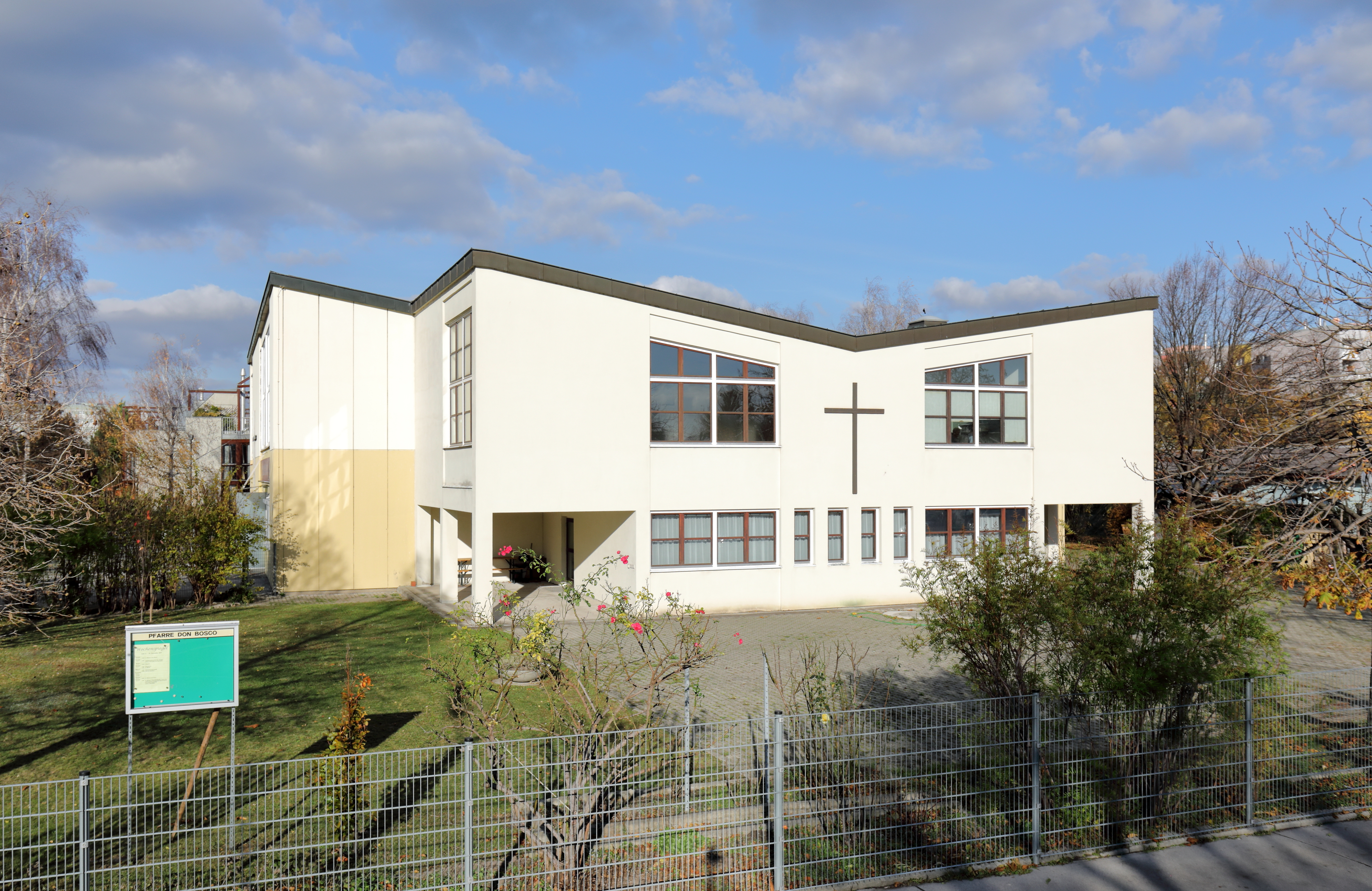 Südansicht der röm.-kath. Pfarrkirche Don Bosko mit dem davor angebauten Pfarrzentrum in der Herzmanovsky-Orlando-Gasse im 21. Wiener Gemeindebezirk Floridsdorf. Die Kirche wurde nach Plänen des Architekten Clemens Holzmeister ab 1970 im Osten der neugebauten Großfeldsiedlung errichtet und am 28. November 1971 durch Bischof Franz Jachym geweiht.